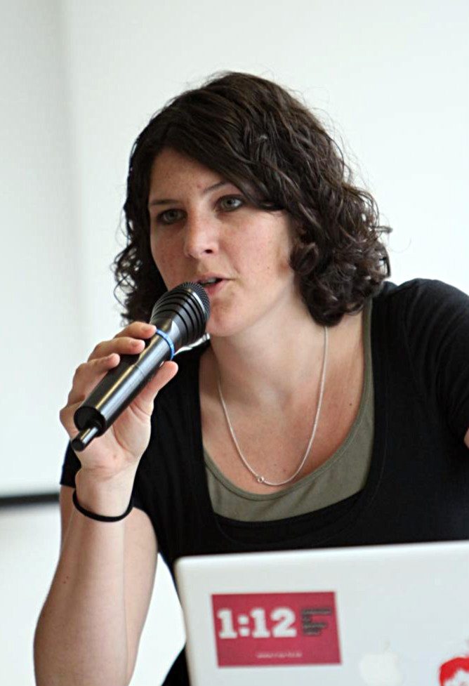 Tanja Walliser an der Delegiertenvertsammlung der JUSO Schweiz im Mai 2010